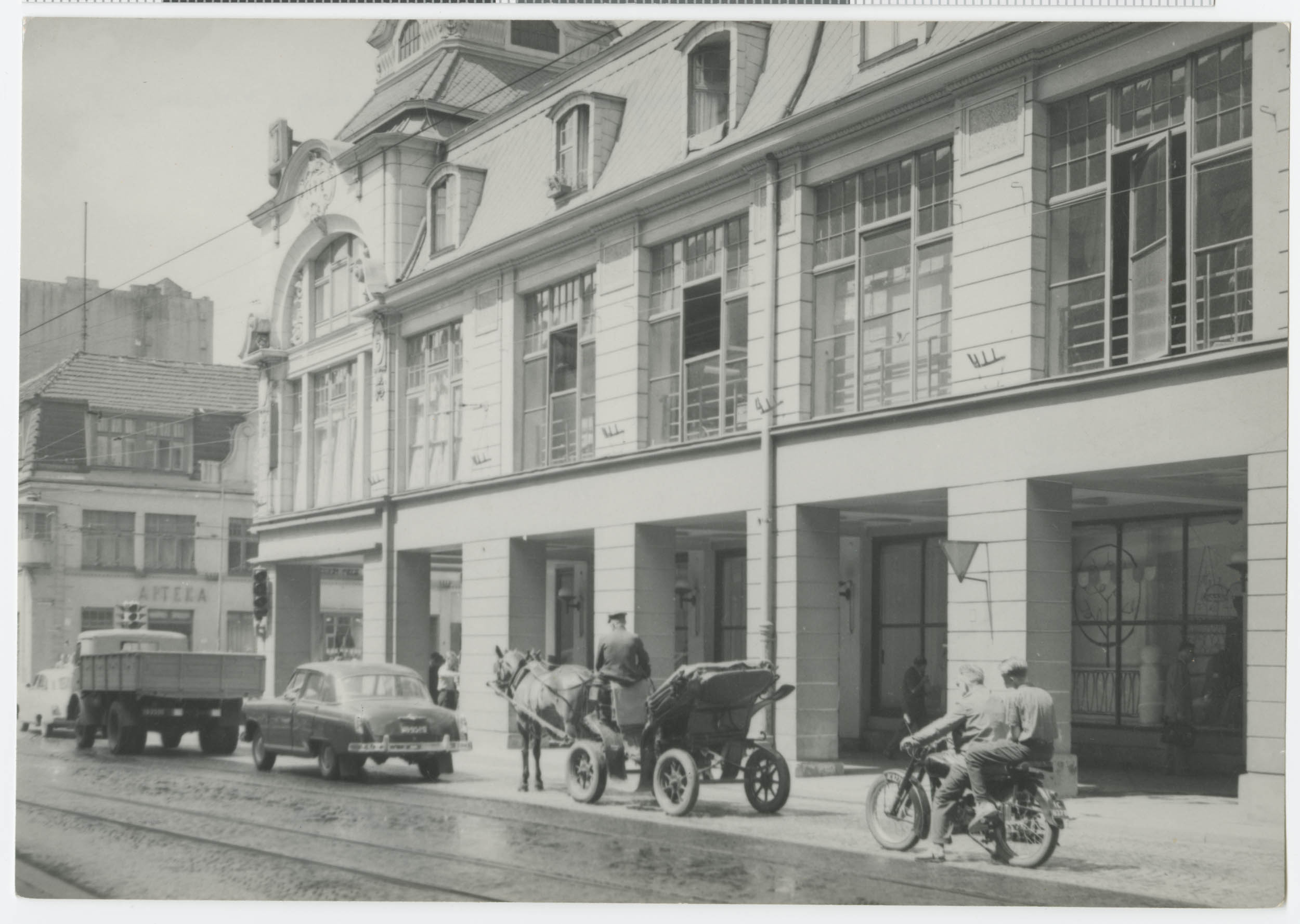 Fotografia Ignacego Płażewskiego przedstawiająca Powszechny Dom Towarowy mieszczący się przy skrzyżowaniu ulic Tuwima i Piotrkowskiej. Budynek mieszczący się przy ul. Piotrkowskiej 98 to przede wszystkim dawny magazyn konfekcyjny Emila Schmechela z towarami luksusowymi. Wcześniejszy budynek został przebudowany w latach 1906-1911, przez co uzyskał charakterystyczną i ciekawą formę o cechach modernistycznych. Widniejący w kartuszu 1892 rok jest datą założenia firmy Schmechela. Po II wojnie światowej budynek pełnił nadal funkcję handlową, nazywany powszechnie „Domem Buta”. W 1990 r. został zniszczony przez pożar. Dopiero w 1999 r. po kolejnych modernizacjach powstała w nim Galeria Centrum, która została zamknięta w 2003 r. Dziś budynek stoi pusty. Na fotografii widać także ulicę Tuwima, po której poruszają się różnego rodzaju pojazdy m.in. ciężarówka i bryczka konna. Fragmentarycznie widać również budynek mieszczący się przy ulicy Piotrkowskiej 95, z charakterystyczną budką policjanta. Pierwsze zabudowania na tej parceli pojawiły się już w latach 30. XIX wieku. W 1950 r. na skrzyżowaniu pojawiła się sygnalizacja świetlna i budka policjanta stała się niepotrzebna. W 1970 r. budynek został wyburzony, na jego miejscu pojawiły się wiaty handlowe. W latach 90. XX wieku powstał tam dom handlowy Saspol.